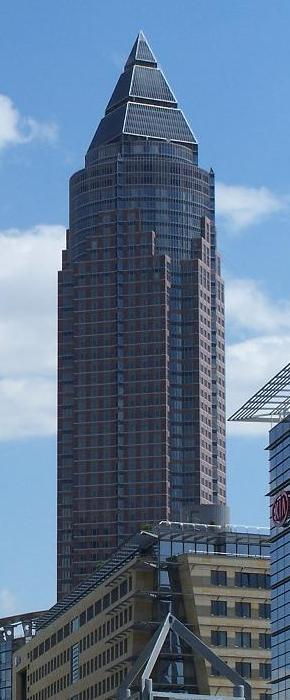 Messeturm, Frankfurt